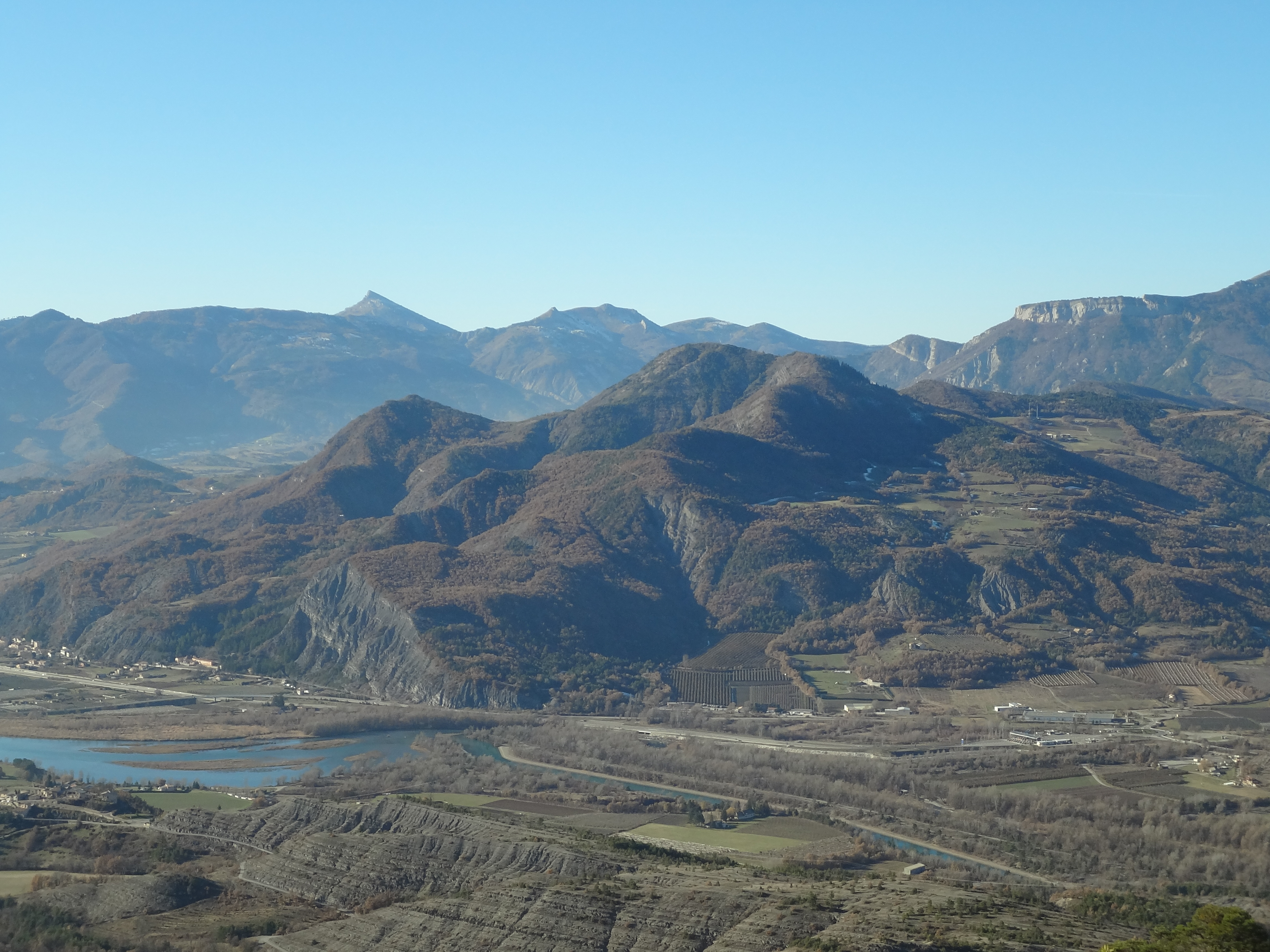 Montagne de Serre Soleille, vue de la route d'Urtis, 1193 m